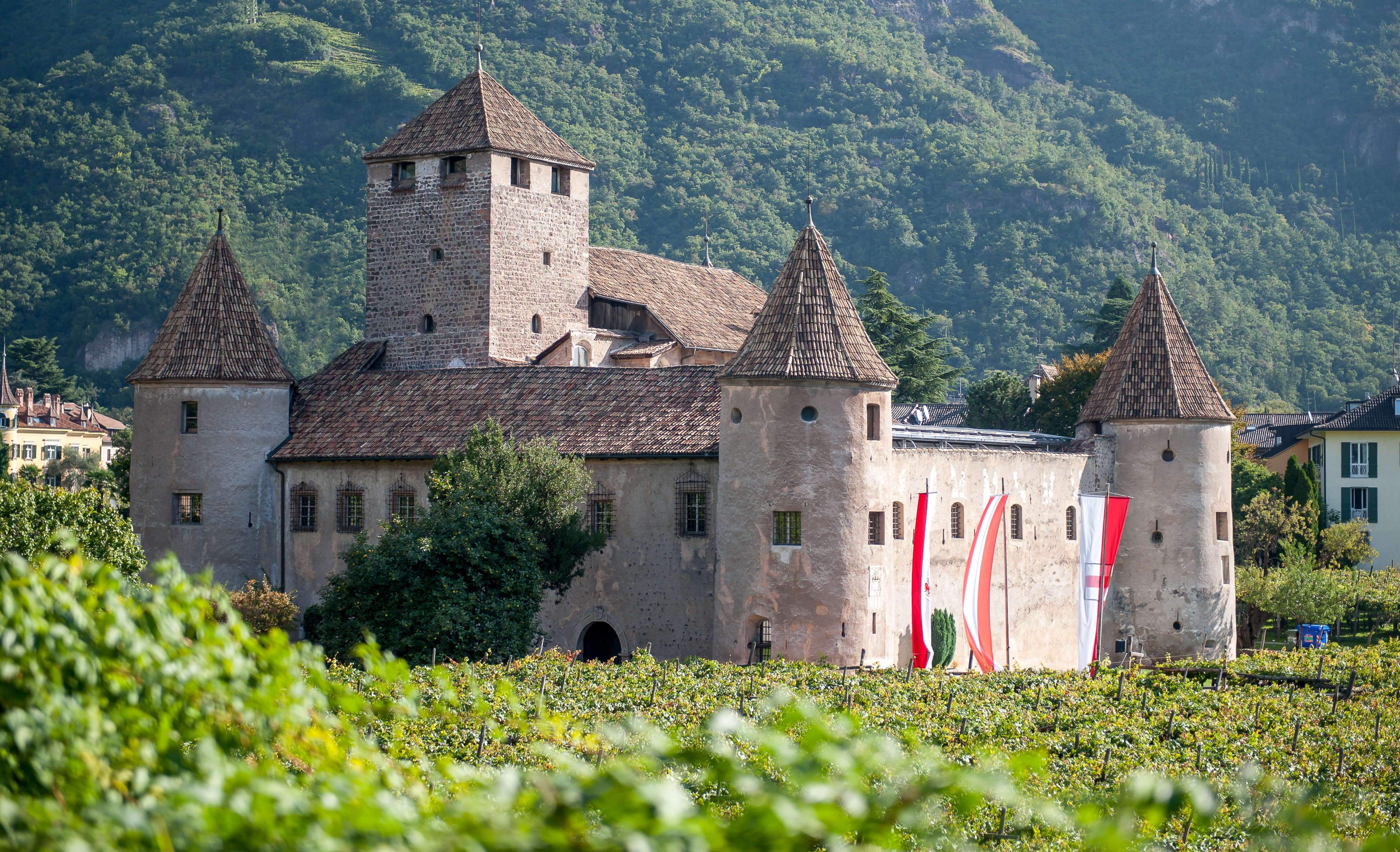 Maretsch in Bozen im September 2014